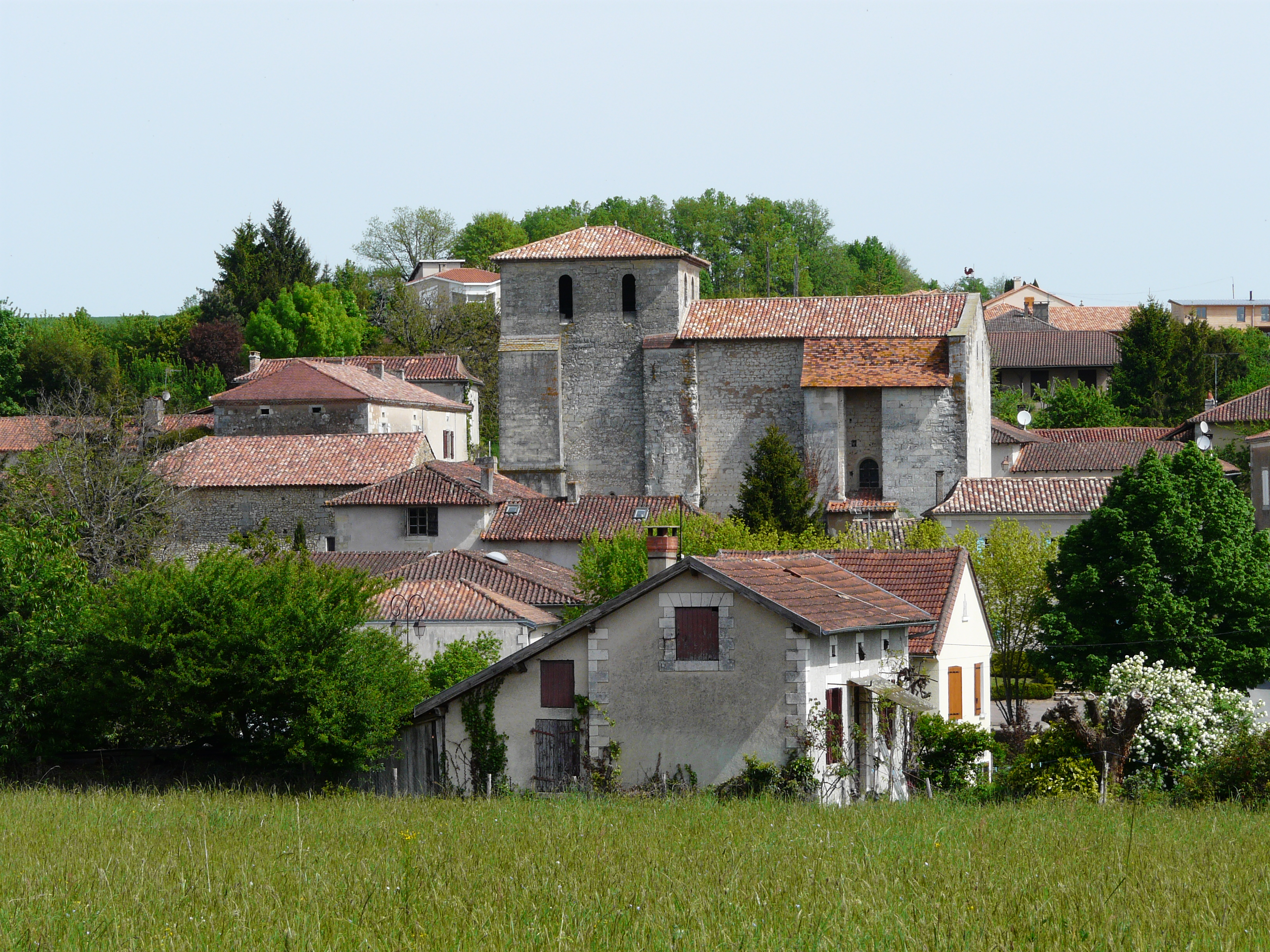 Vue générale de La Chapelle-Gonaguet